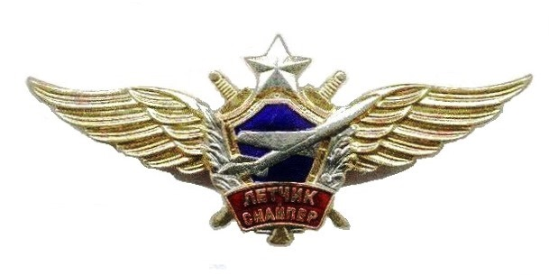 Знак "Военный лётчик-снайпер" образца 1995 года